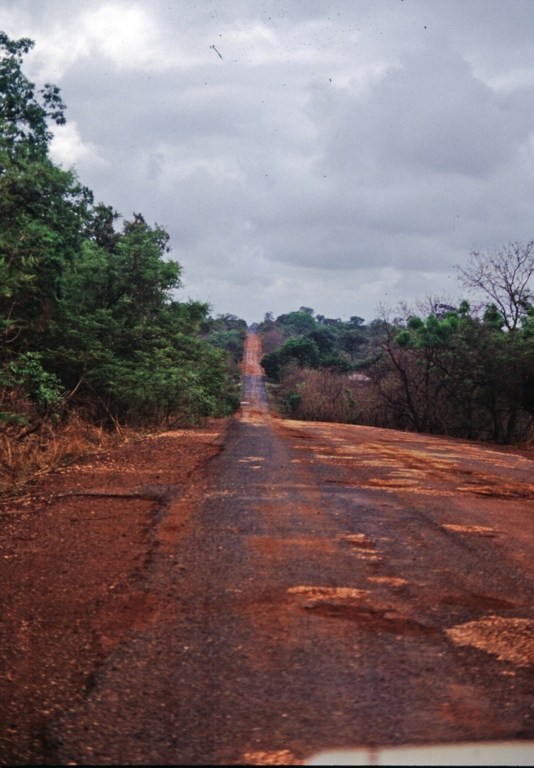 Die Süduferstraße Richtung Georgetown, von Straße kann man kaum noch reden, es sind nur noch Löcher vorhanden die von Asphaltstreifen zusammen gehalten werden; in der Nähe von Soma